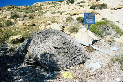 Titel: Strand dat betere tijden heeft gekend Locatie: Anafí, Griekenland Datum: juni 2004 Fotograaf: Gebruiker:IMFJ